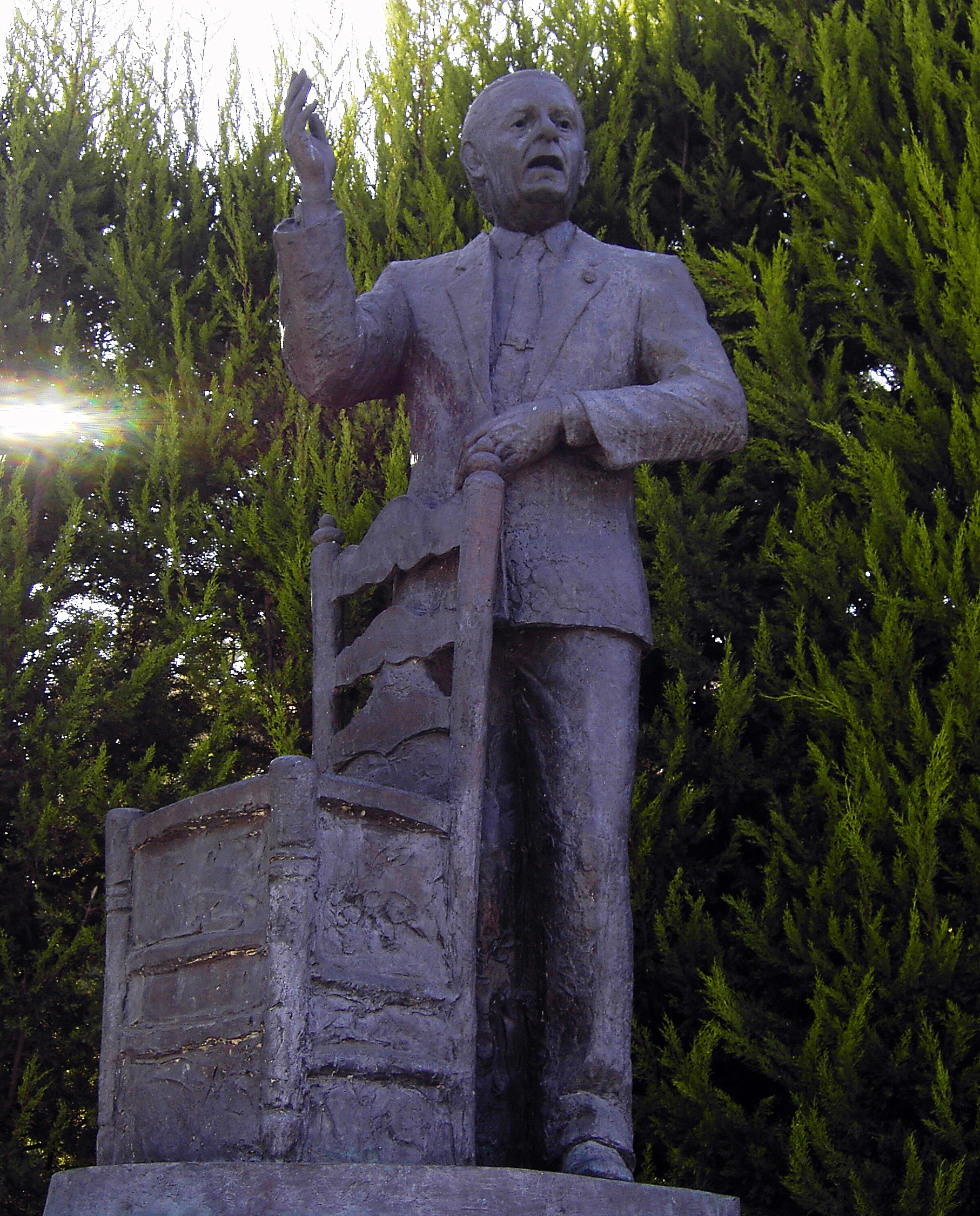 Monumento a Paco Toronjo (Huelva)